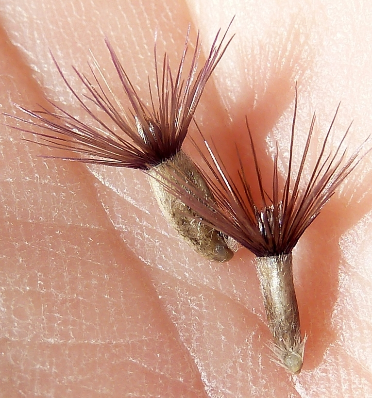 Centaurea saxicola : Cipselas sueltas - Cabezo de Pallarés, Albatera (Alicante, España)